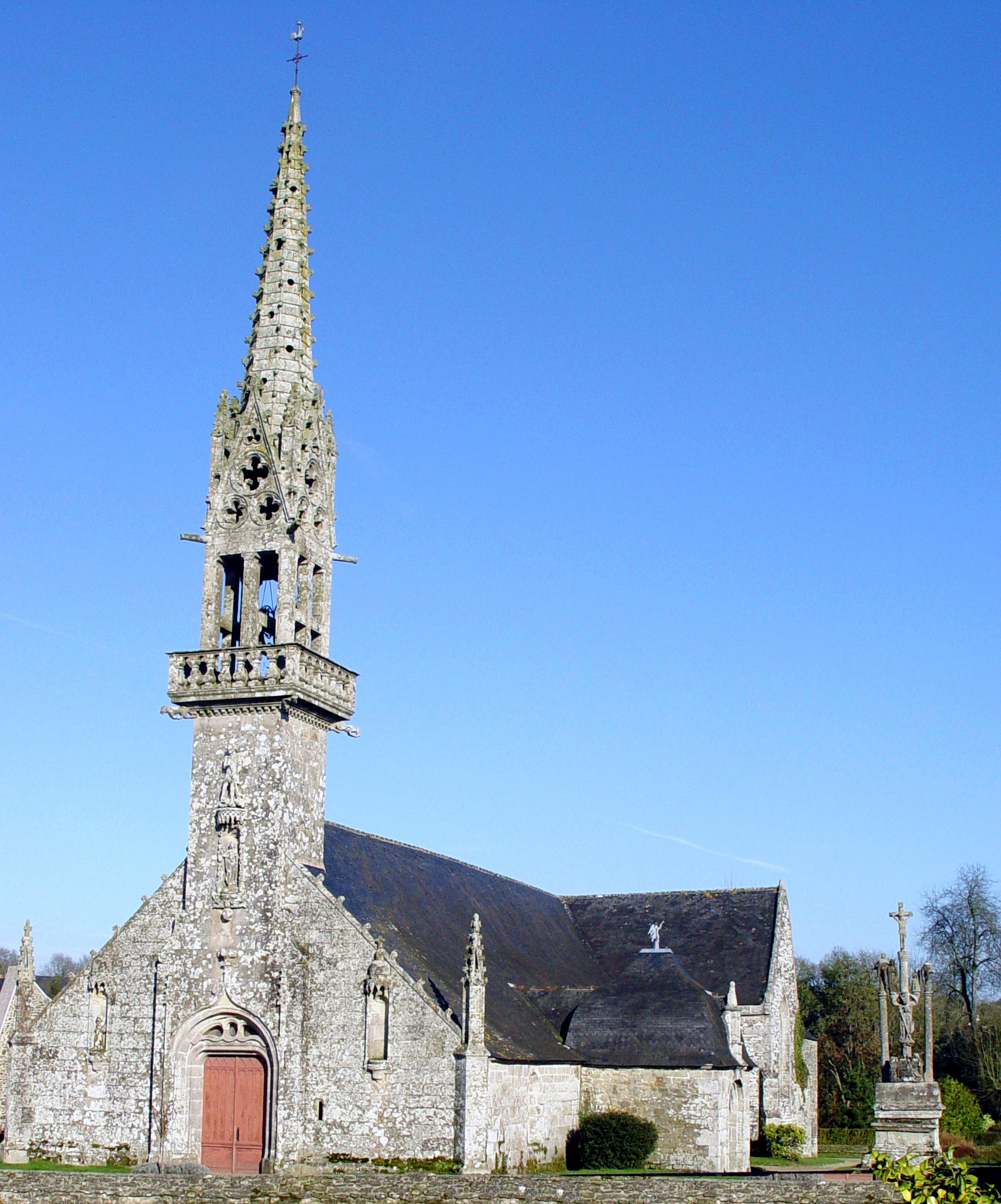 Saint-Hernin (Bretagne, Finistère): Pfarrkirche